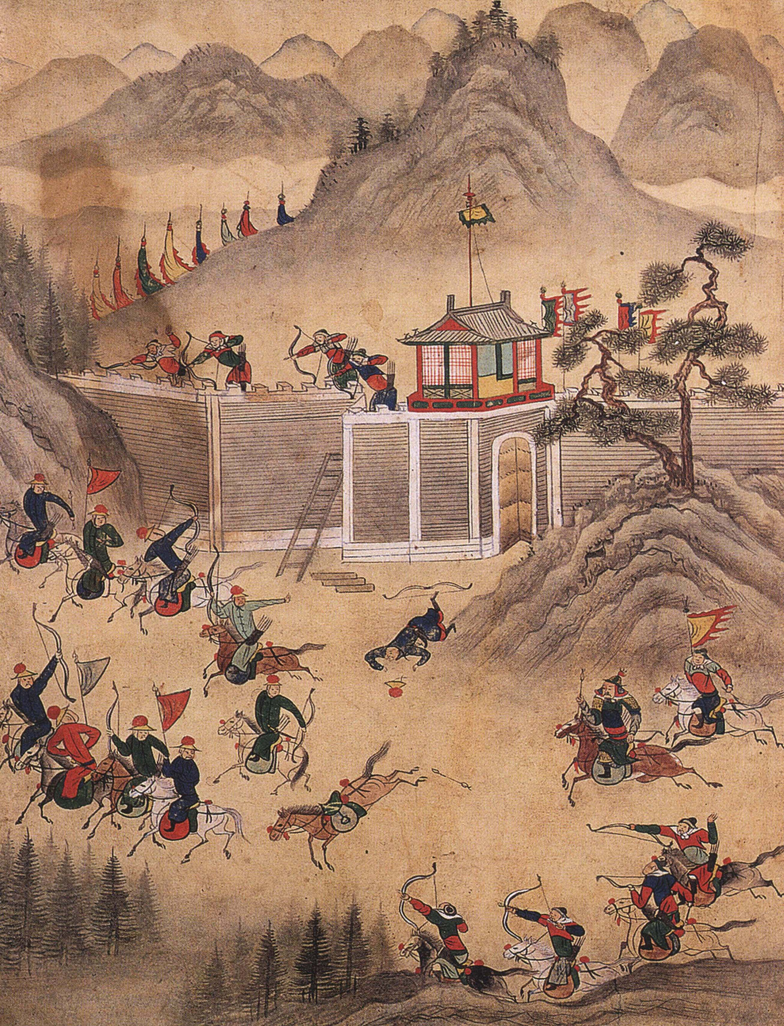 북관유적도첩(北關遺蹟圖帖)-일전해위도(一箭解圍圖)